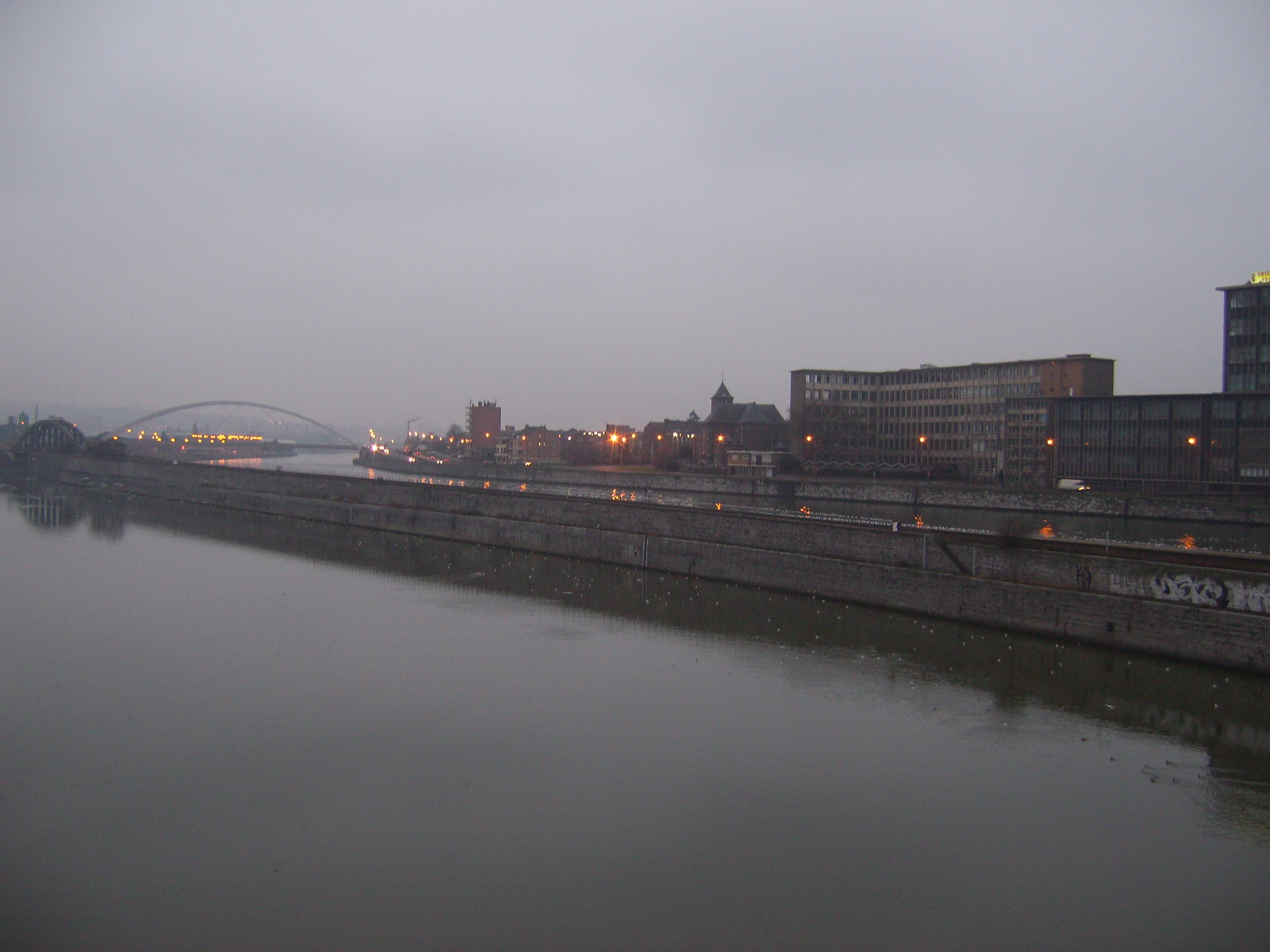 eigen werk Ruben Alexander